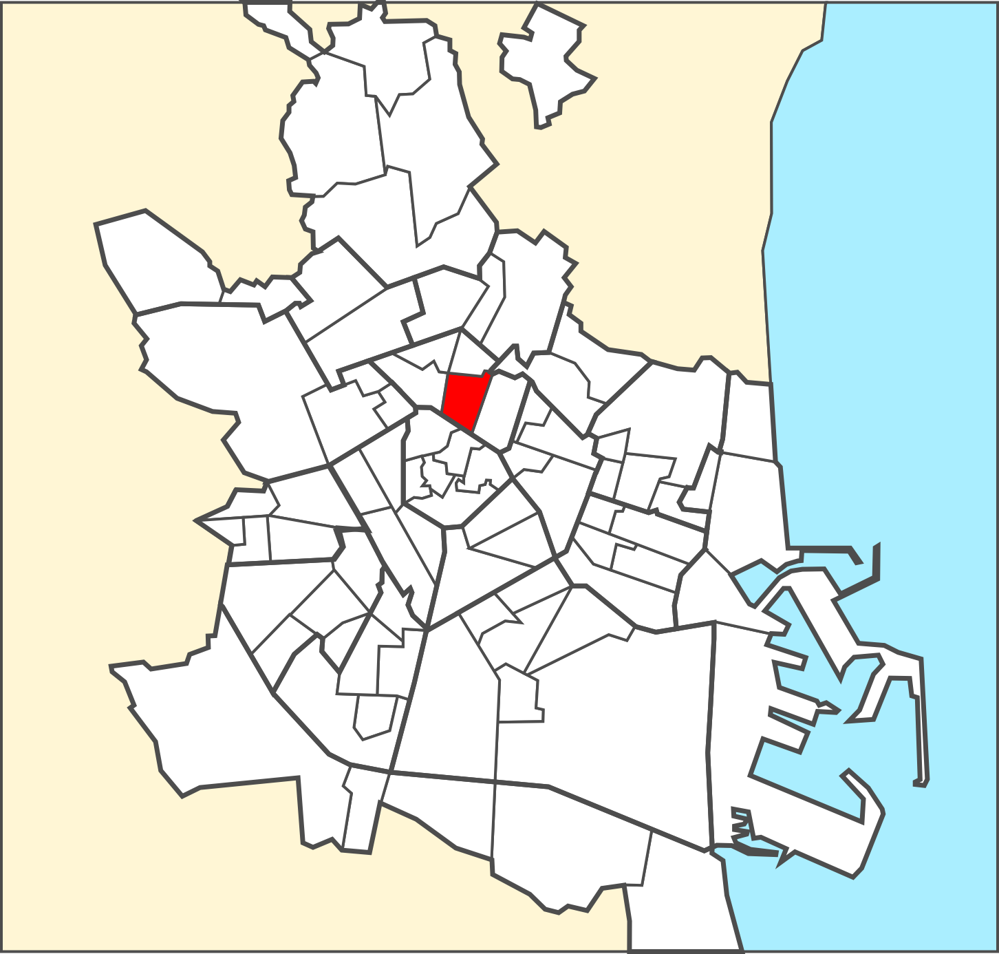 Localització del barri dins de la ciutat de València.